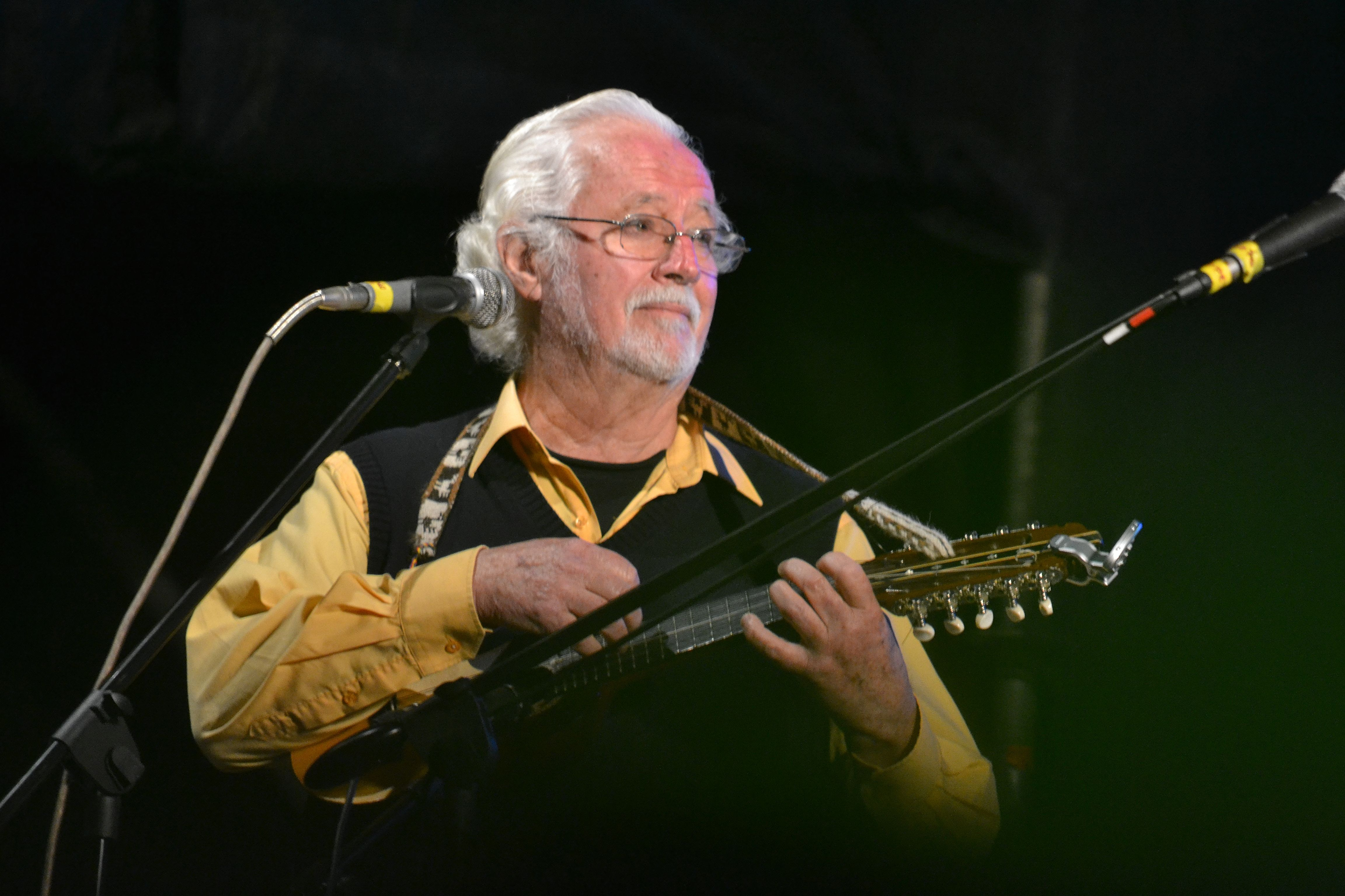 Horacio Durán, músico chileno.